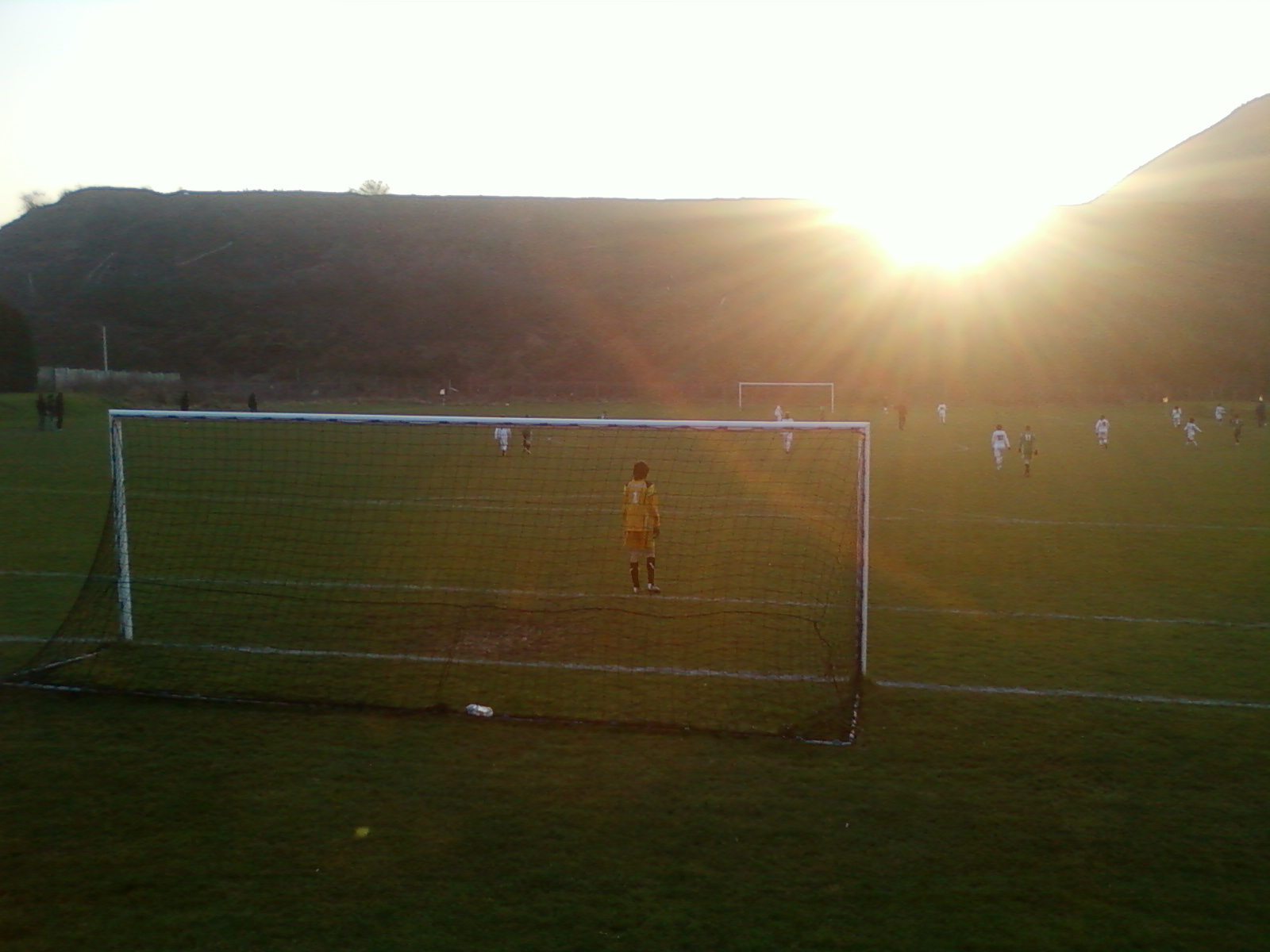 Photo du stade delmotte depuis le mont derrière un but